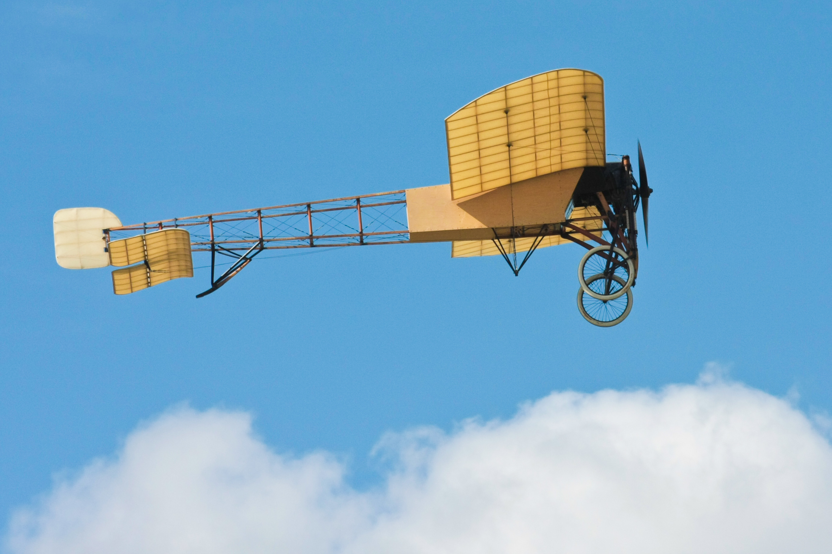 Bleriot XI on air @ Ljungbyhed. Håkan Dahlström Photography